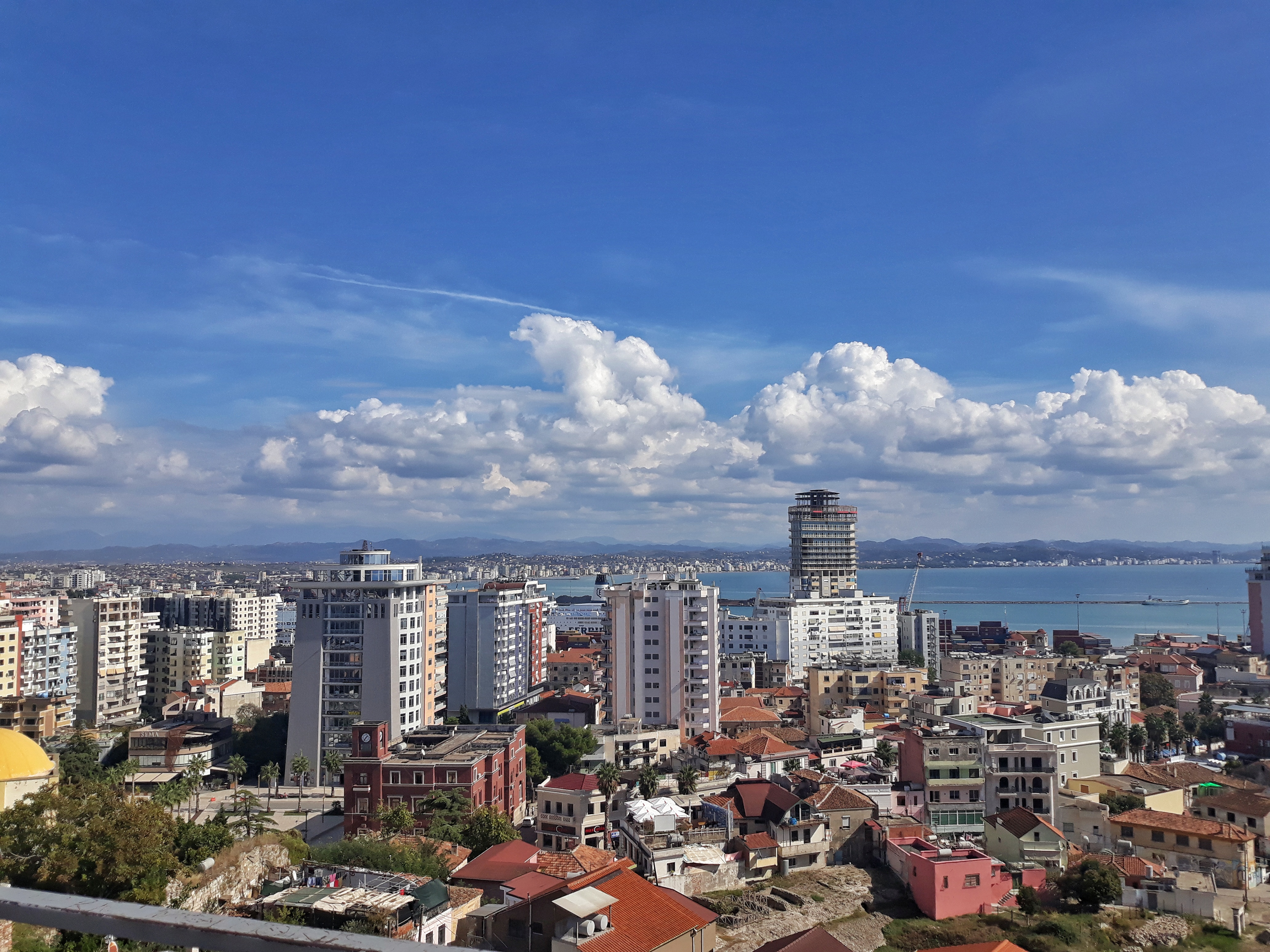 Pamje e qytetit nga një vend i quajtur "Ballkoni i Durrësit"